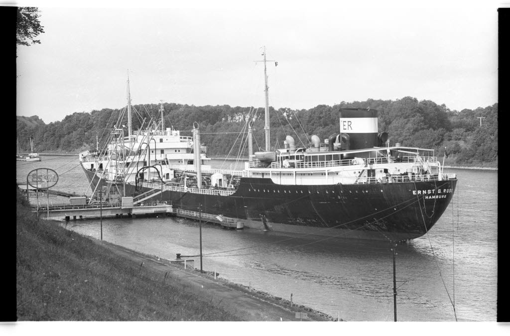 an der ESSO-Bunkerstation Projensdorf im Nord-Ostsee-Kanal.